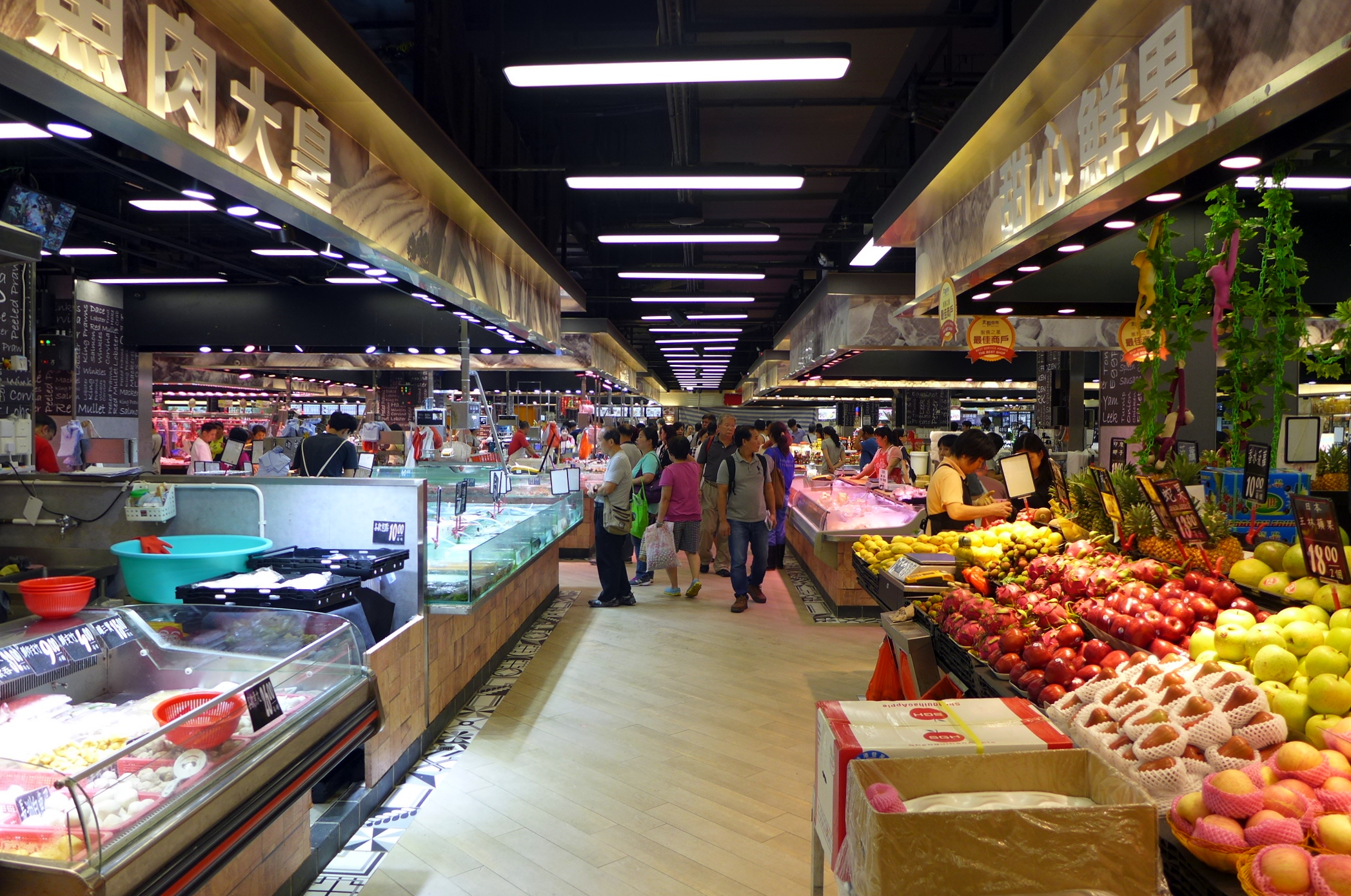 Tai Wo Market